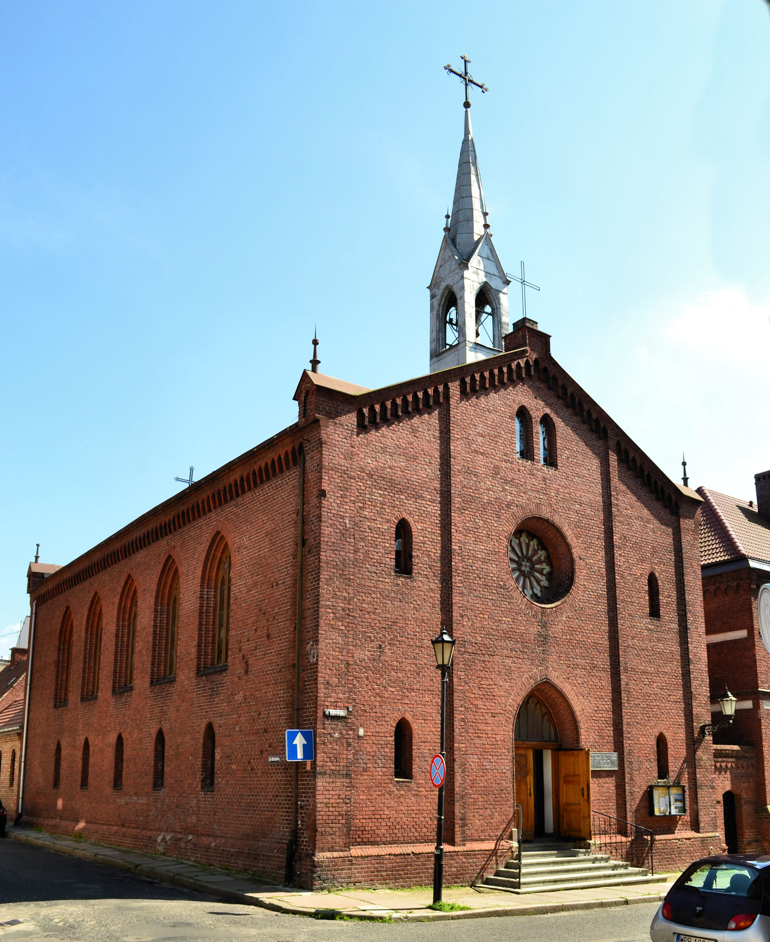 Kościół rektorski w Kołobrzegu